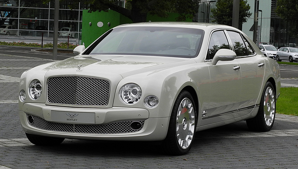 Bentley Mulsanne - przód